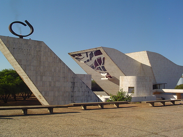 Panteão da Pátria Tancredo Neves na Praça dos Três Poderes em Brasília. Lá se encontra o Livro de Aço dos Heróis da Pátria.Panteão da Pátria Tancredo Neves